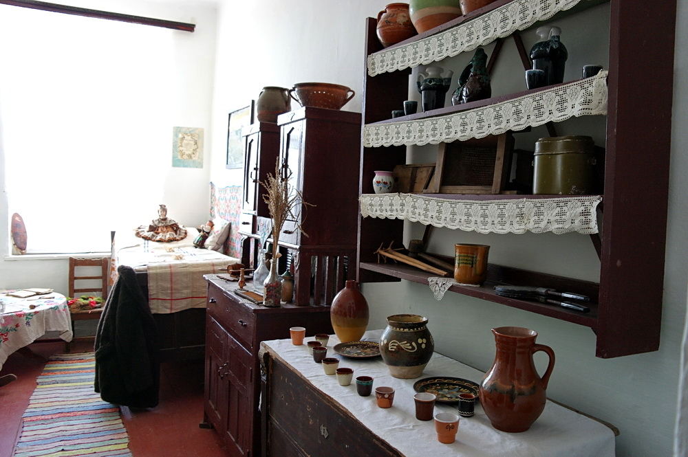 Музей при місцевій школі